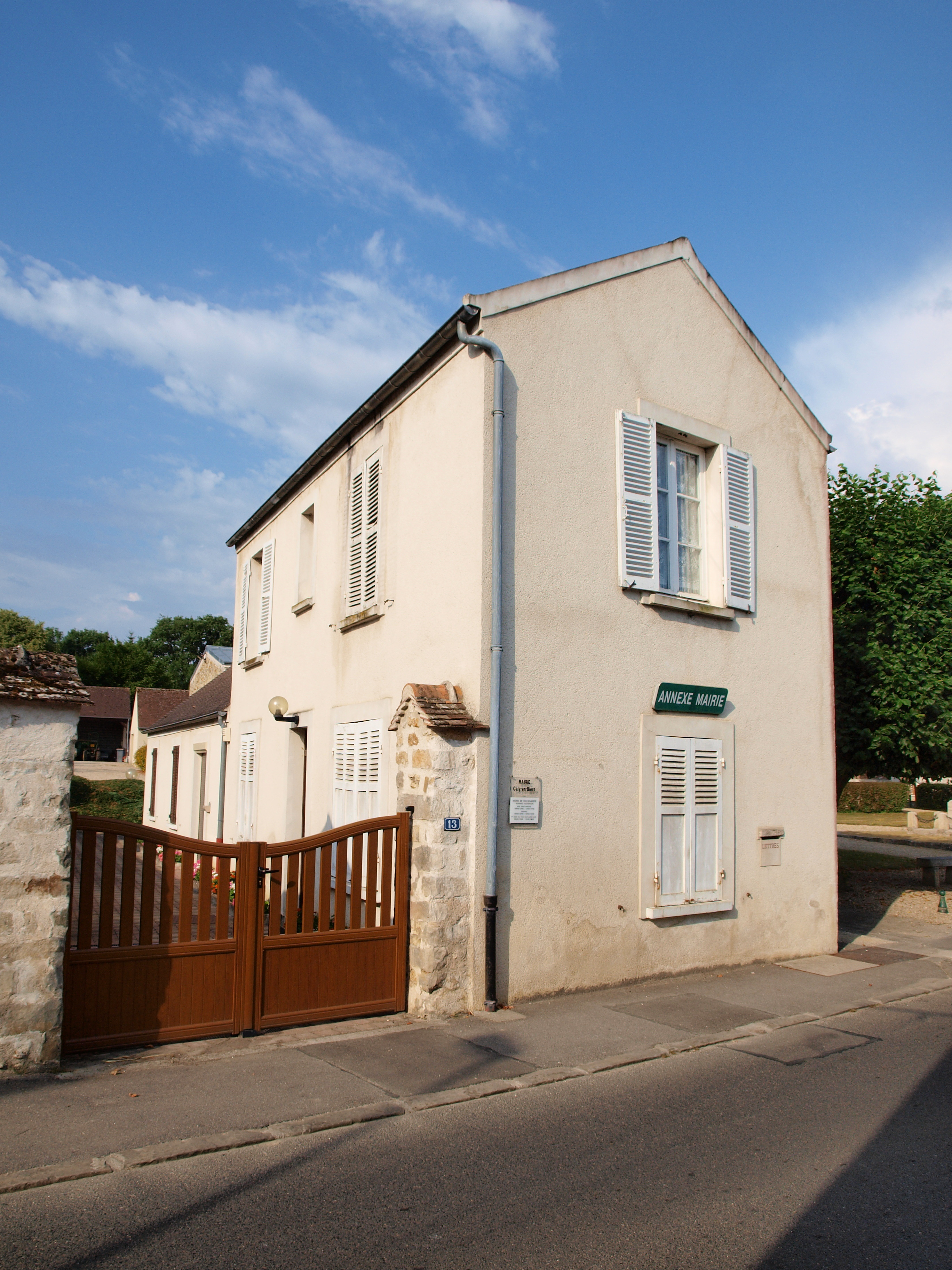 Mairie de Cély-en-Bière (Seine-et-Marne, France)